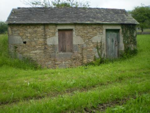 O Muíño de Paleo en Xove.